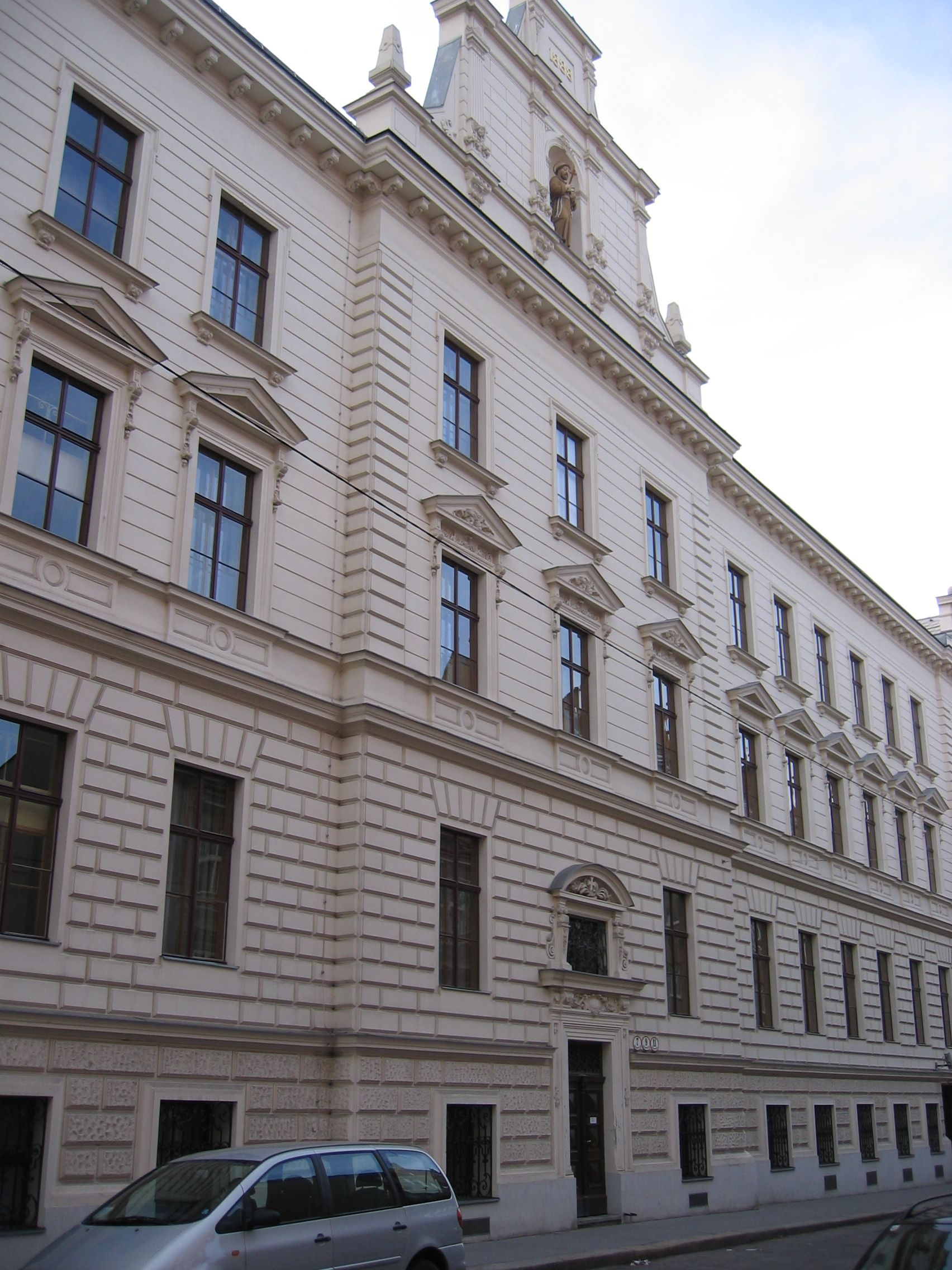 Mutterhaus der Franziskanerinnen von der christlichen Liebe in Wien Margareten